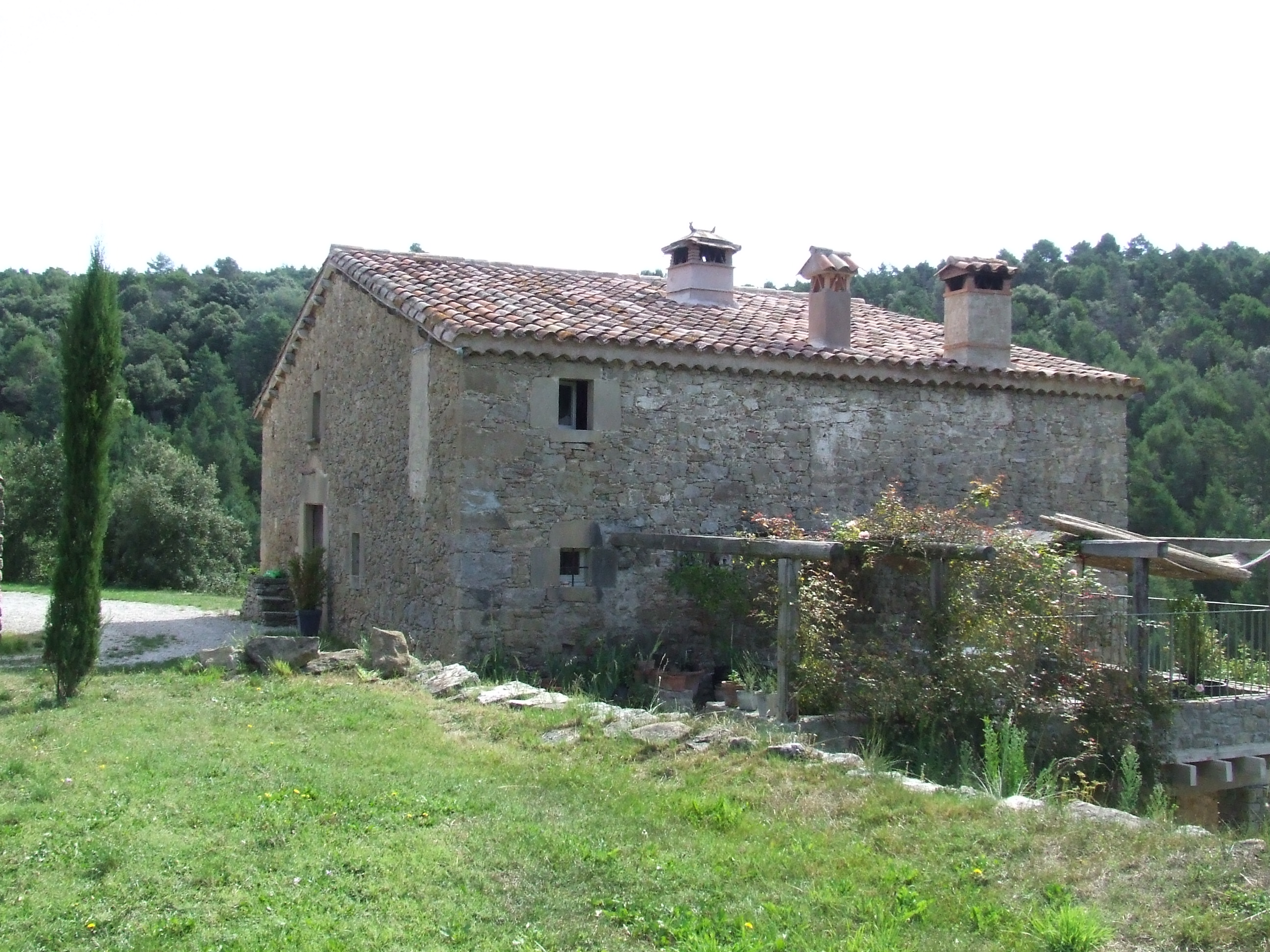 La Roca (Castellcir, Moianès)